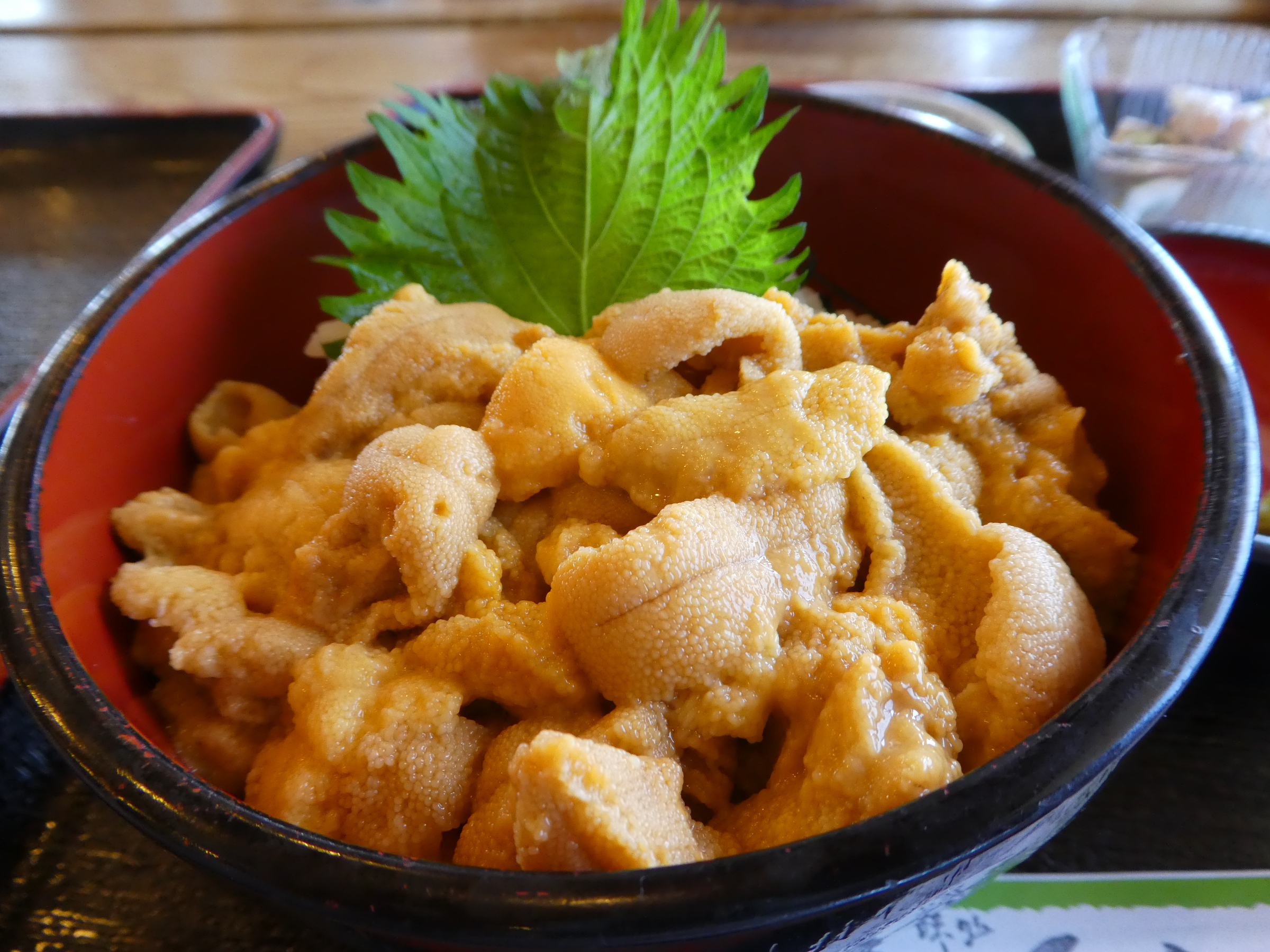 北海道積丹で提供されるうに丼。